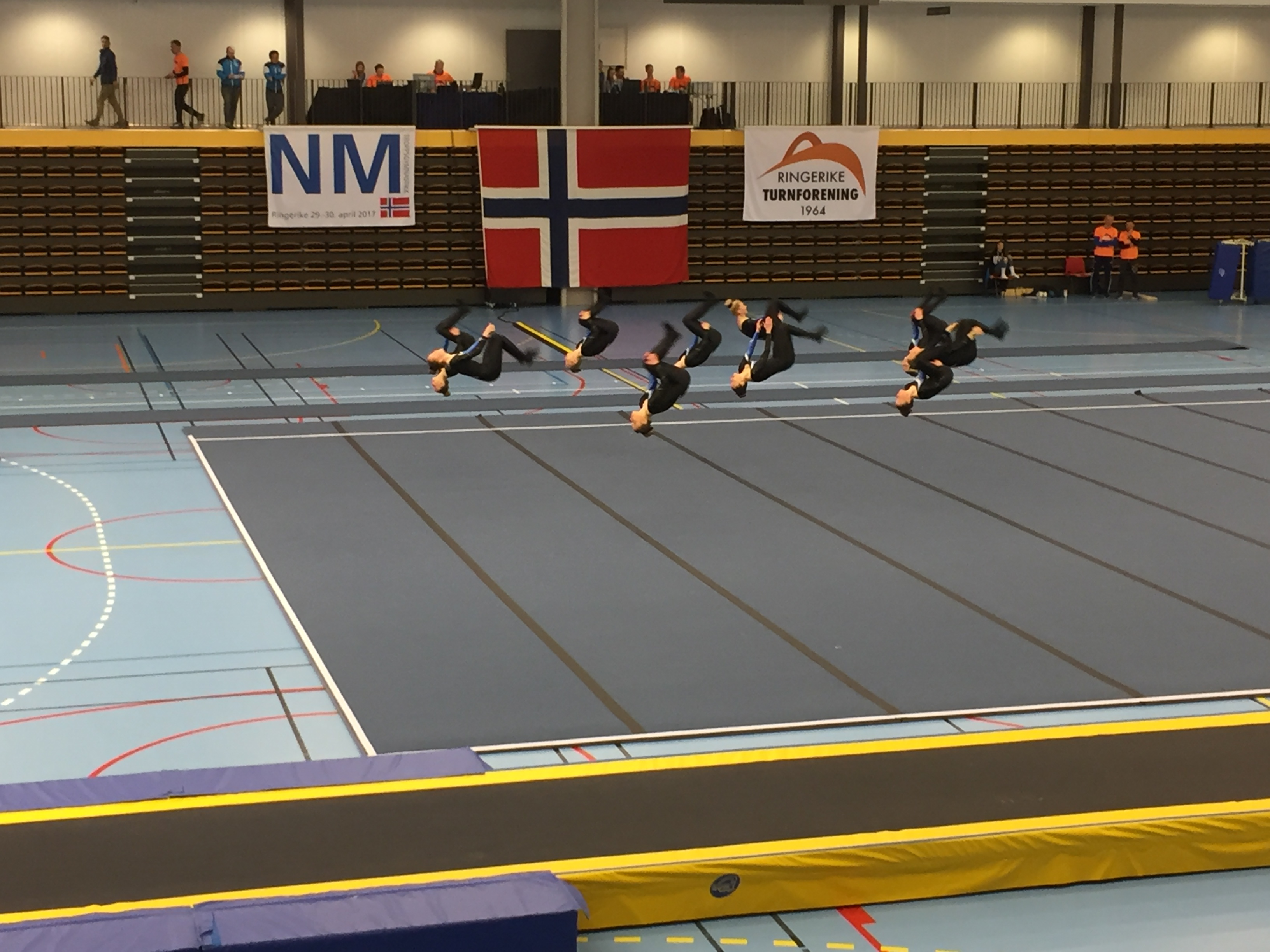 Junior-NM troppsturn 2017 Ringerike - Arendal frittstående kvinner.